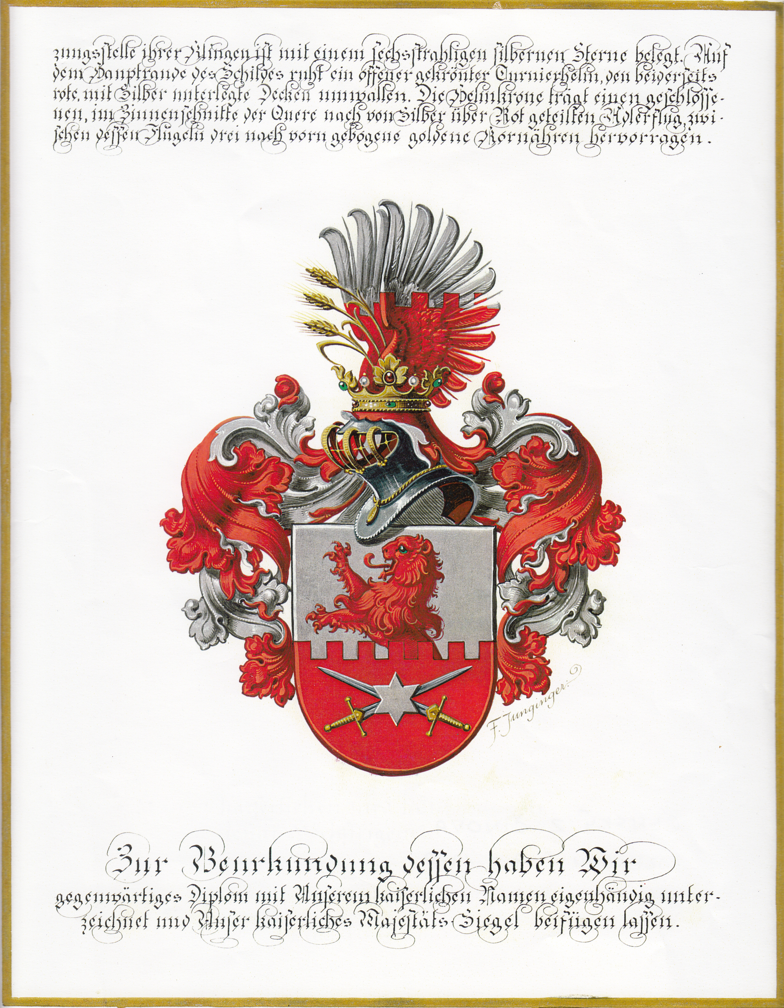 Nobilitační listina rodu Čenských, udělena 21. října 1918